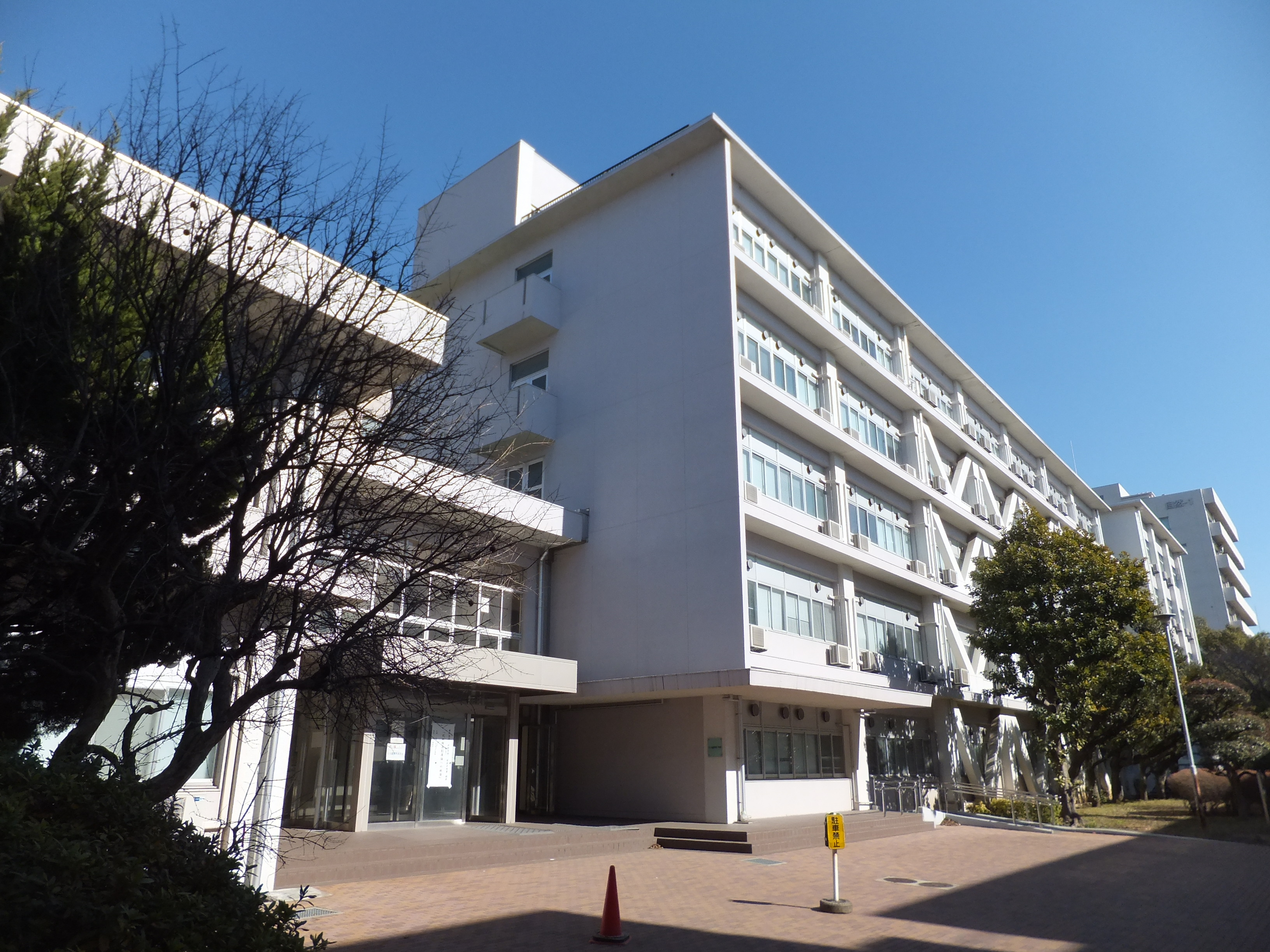 千葉大学法経学部